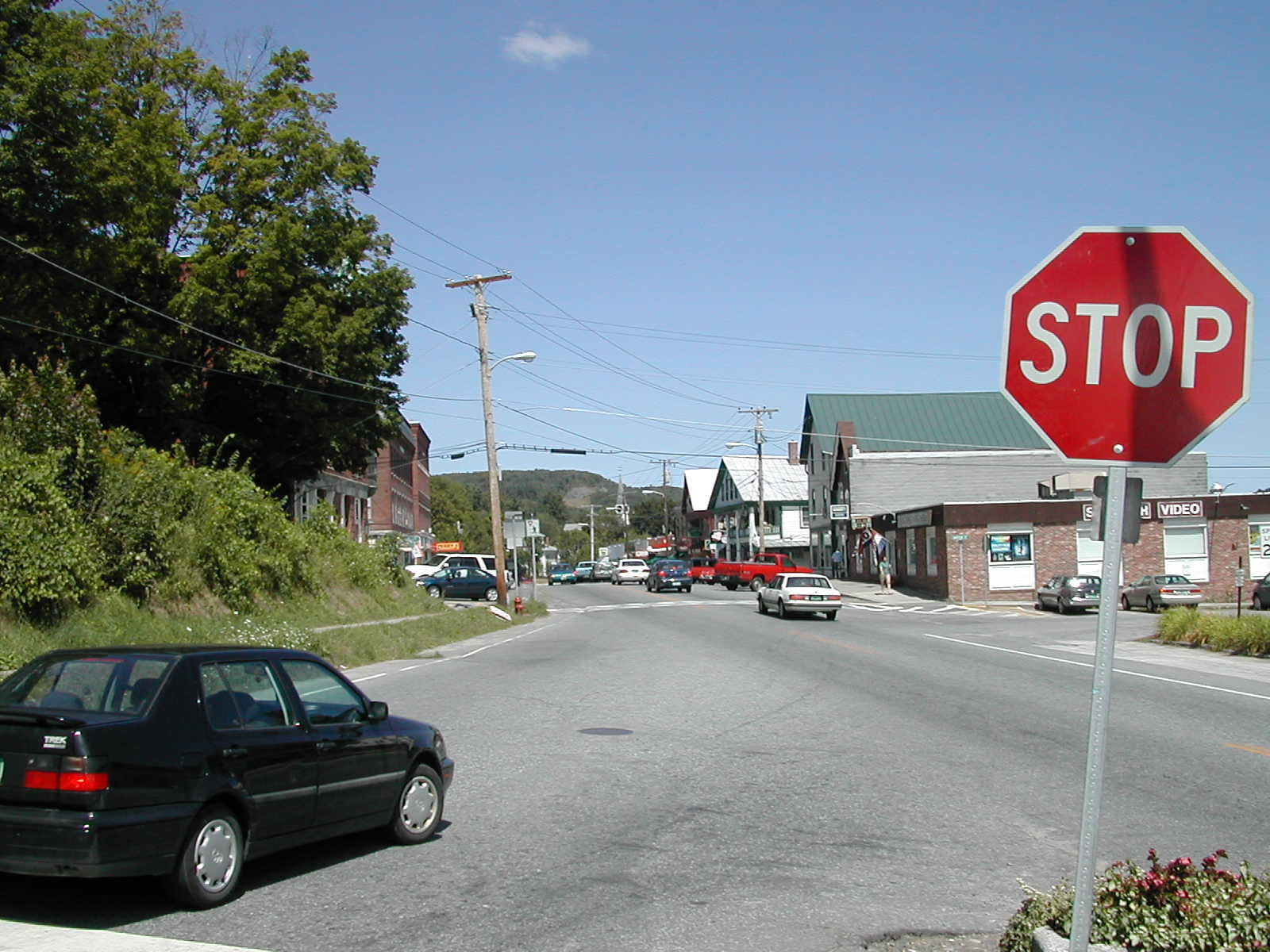 Main St., Bradford, Vermont Main St., Bradford, Vermont